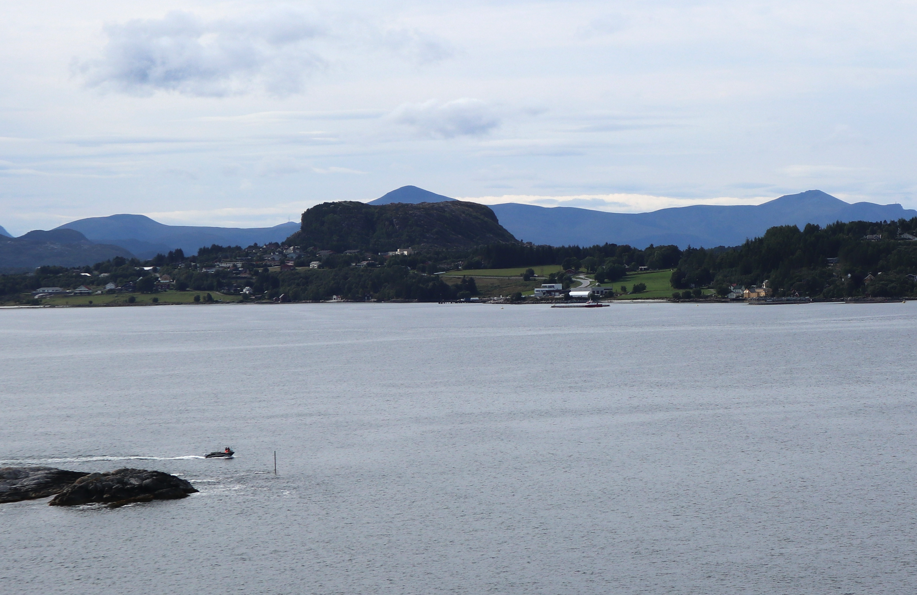 Bremsneshatten er et landemerke i ytre del av Nordmøre.